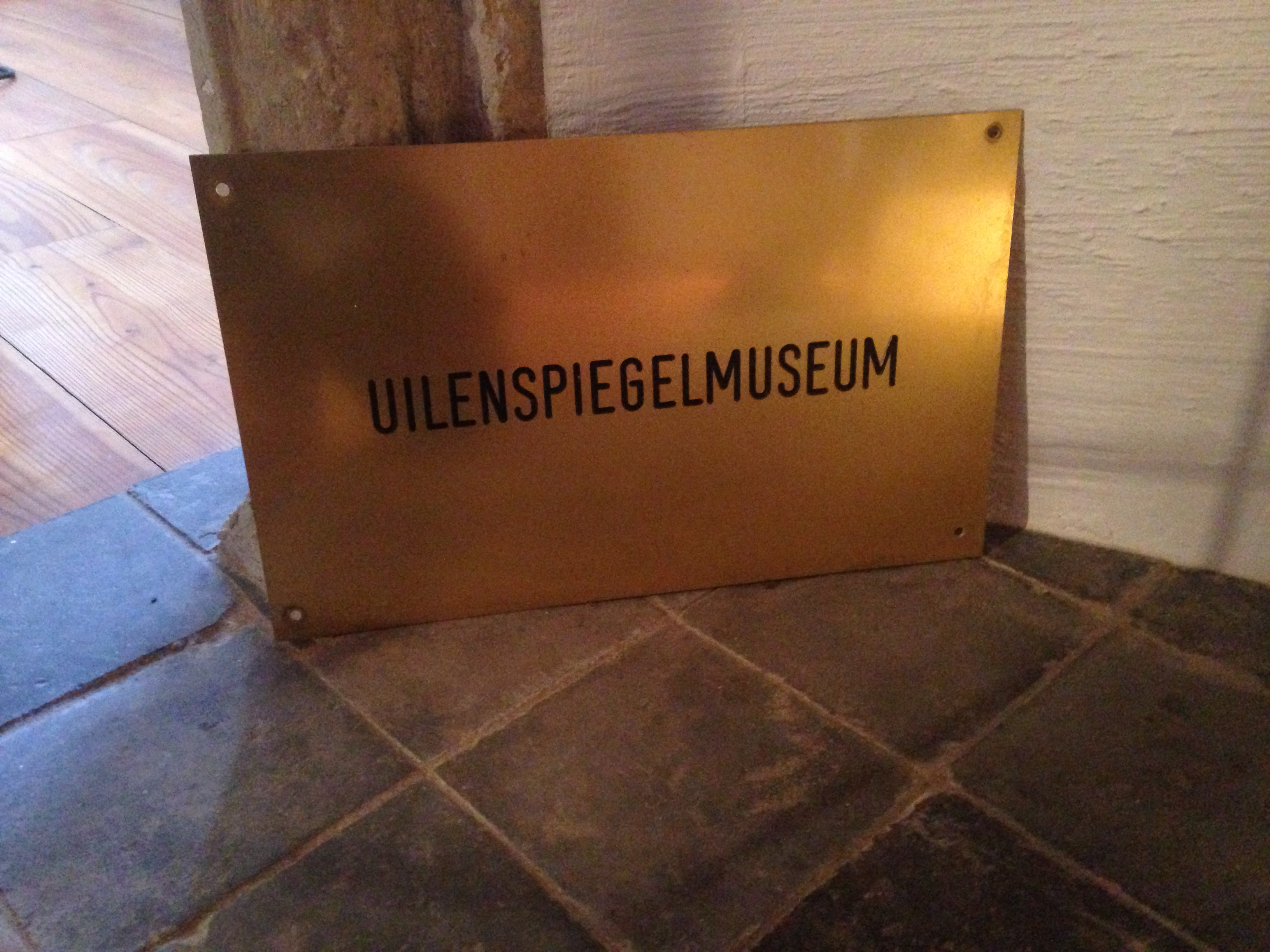 Uilenspiegelmuseum